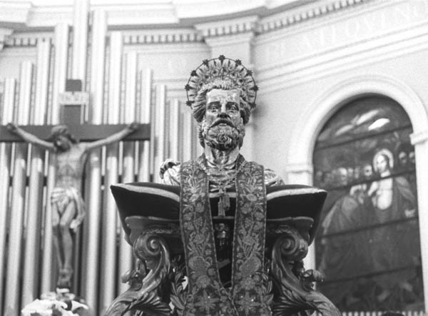 Busto di San Tommaso Apostolo sul baldacchino prima dell'uscita della Solenne Processione del Perdono dalla Basilica di San Tommaso di Ortona